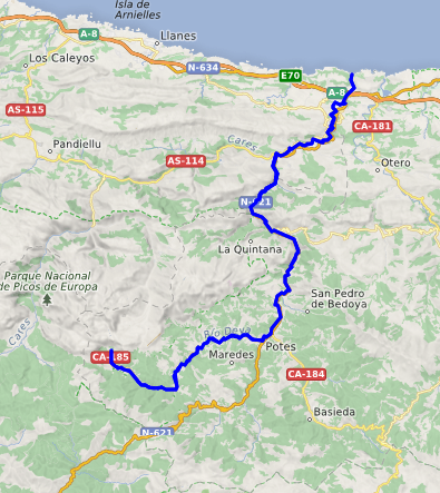 carte réalisée sur umap This map may be incomplete, and may contain errors. Don't rely solely on it for navigation.